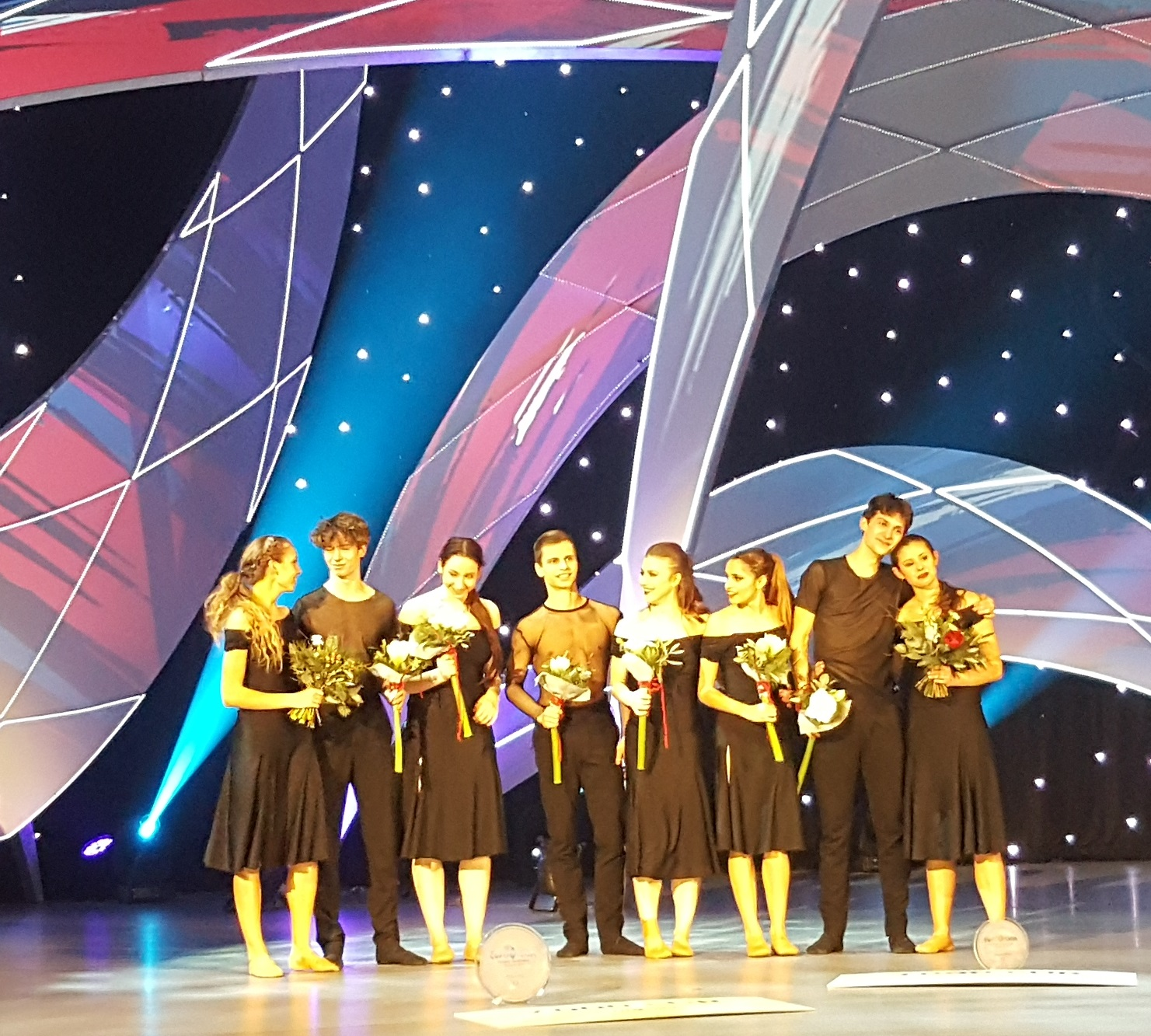 Finaliści Konkursu Eurowizji dla Młodych Tancerzy 2017